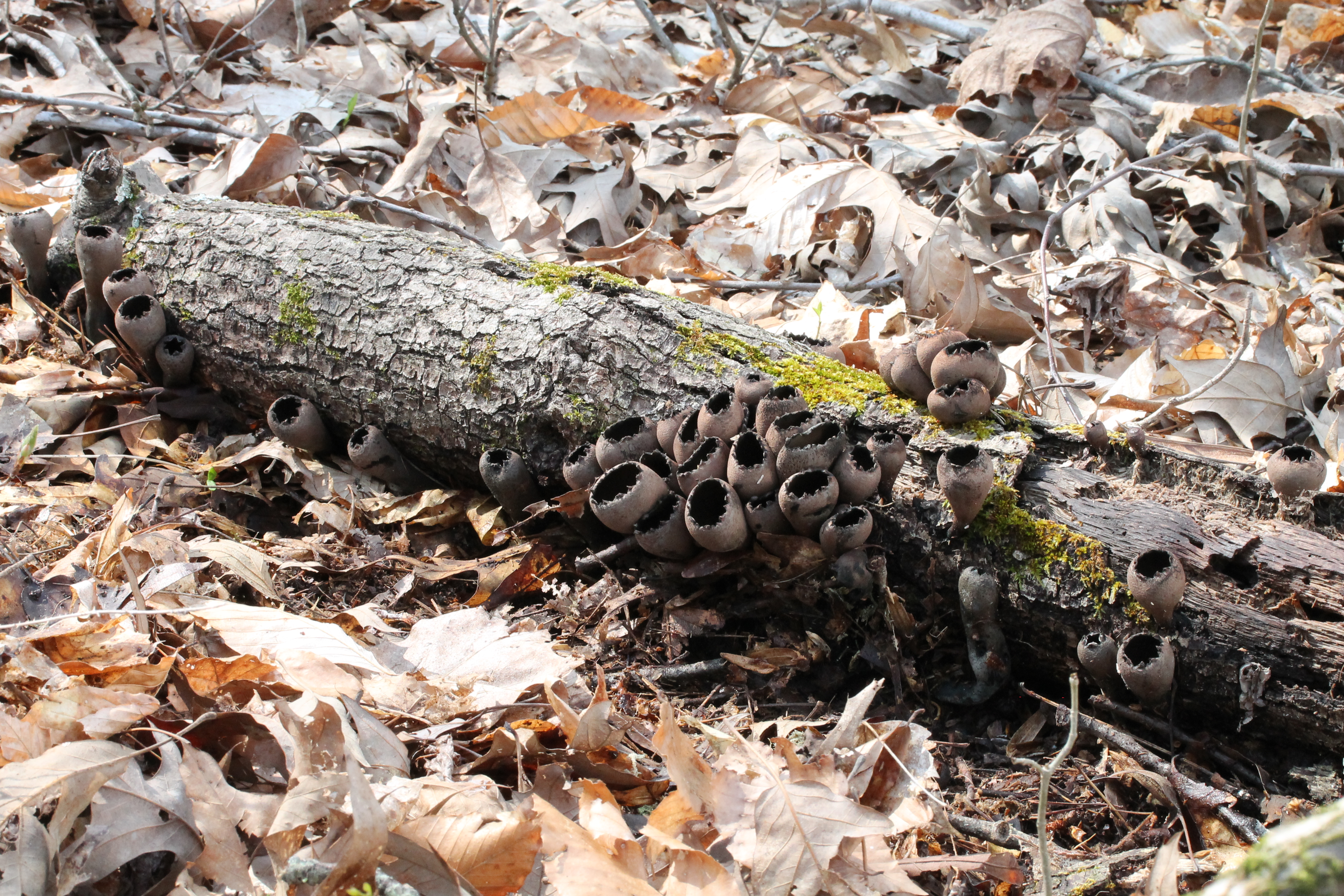 Urnula craterium (Schweinitz) Fries